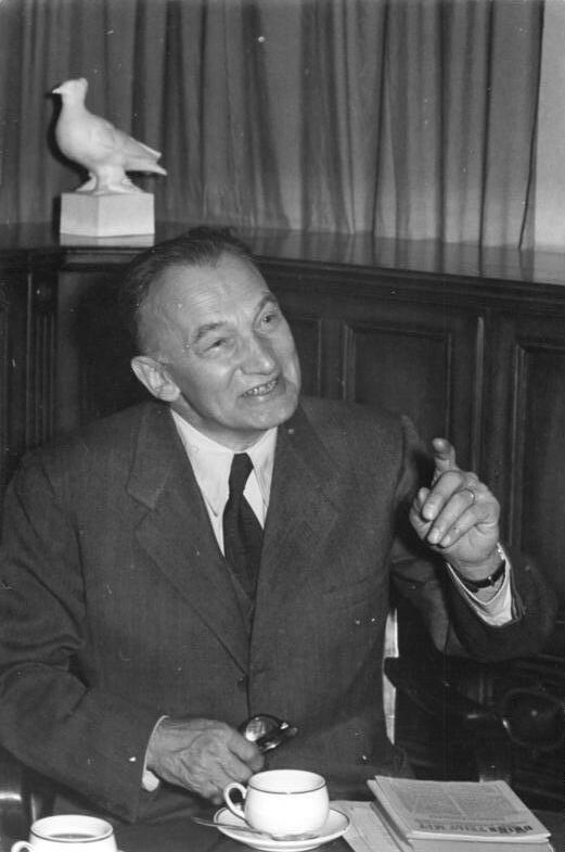 Illus-Schack Kne-Nb. 14.4.1951 Prof. Hromatka besucht CDU-Vorstand. Der Dekan der Theologischen Fakultät der Universität Prag, Prof. Hromatka besuchte am 14.4.1951 den Hauptvorstand der CDU. UBz: Prof. Hromatka Leihweise Illus Berlin WS